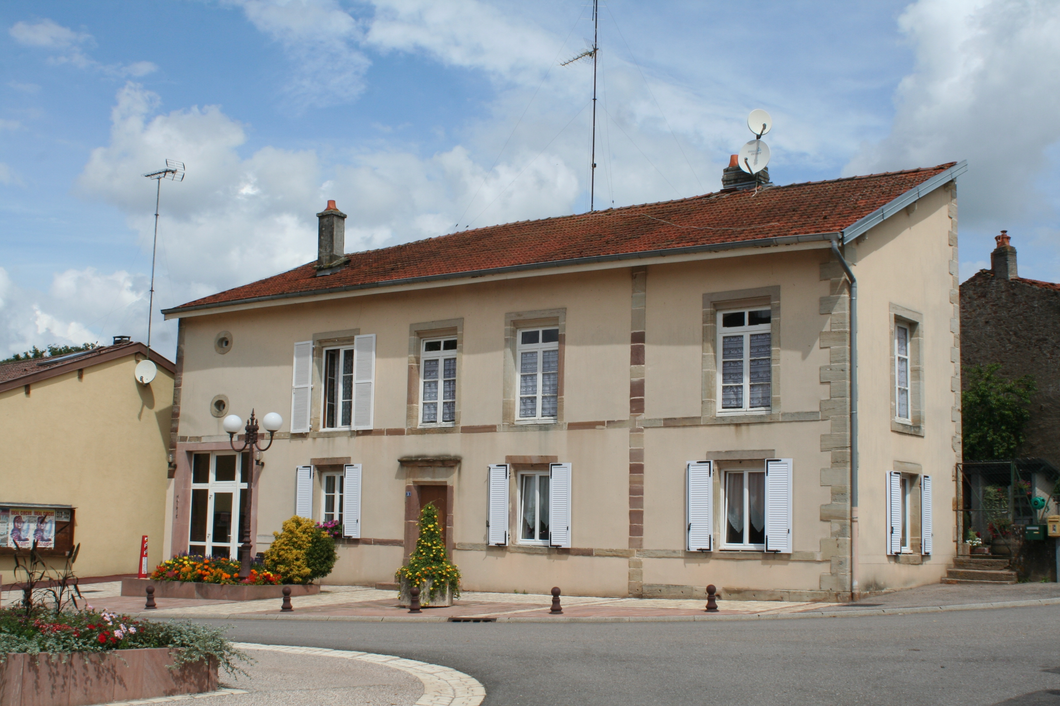 Mairie de ménarmont (Vosges)